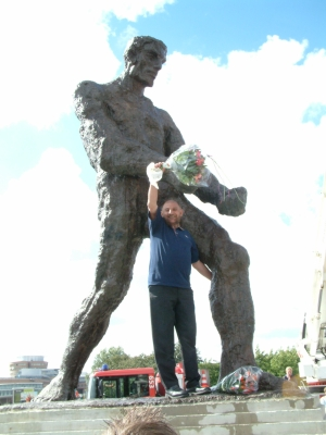 Onthulling Beeld De Houtwerker 2001 in Zaandam/The Netherlands. Eigen foto Jan Lapère